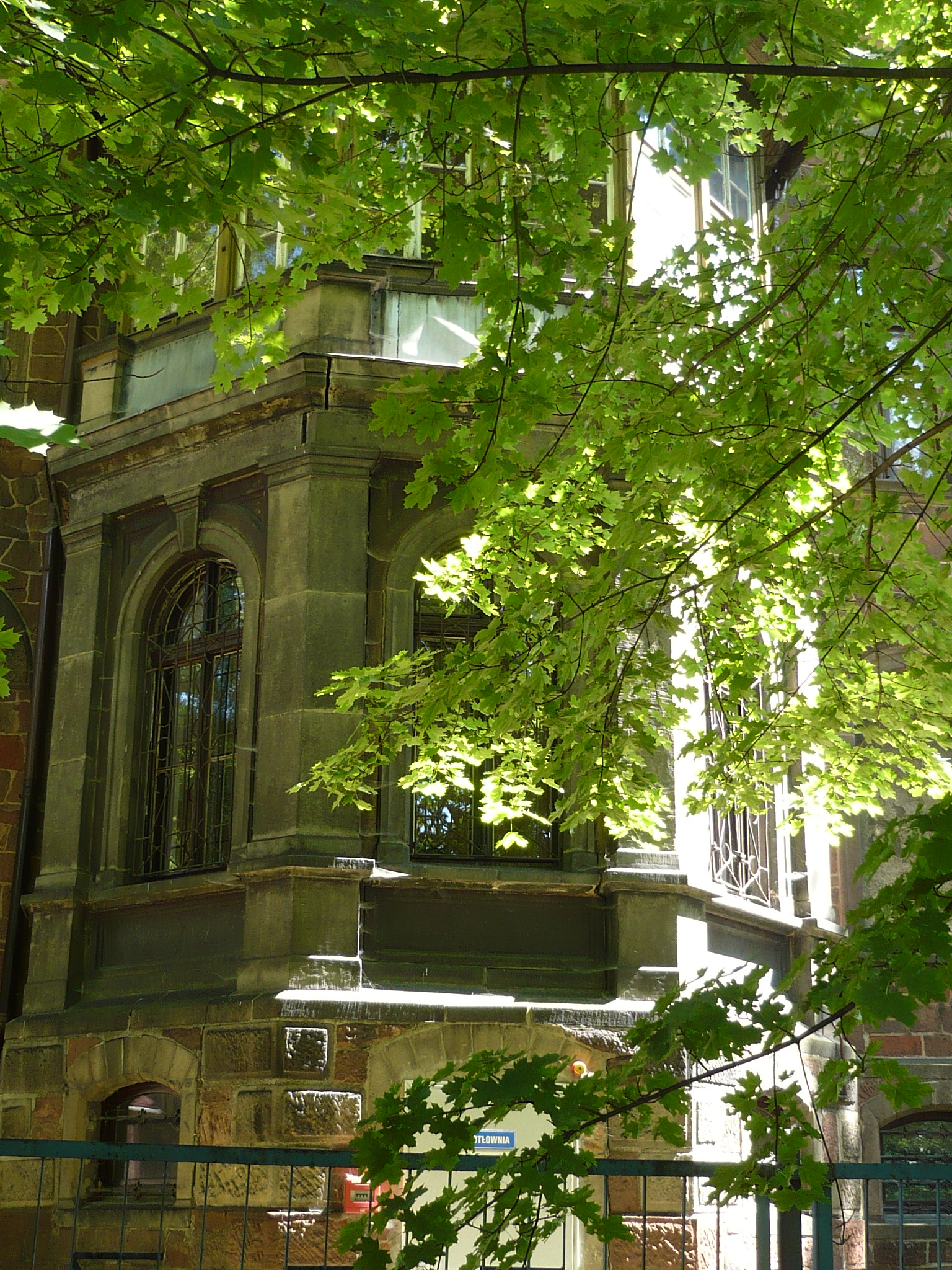 Nowa Ruda, ul. Niepodległości 2 - pierwotnie budynek starostwa powiatowego, następnie siedziba szkoły milicyjnej, sądu, prokuratury, kolegium ds. wykroczeń, komornika, Gminnego Ośrodka Pomocy Społecznej, Rady Gminy Nowa Ruda, obecnie VII Zamiejscowy Wydział Ksiąg Wieczystych i świetlica kuratorska, 1877